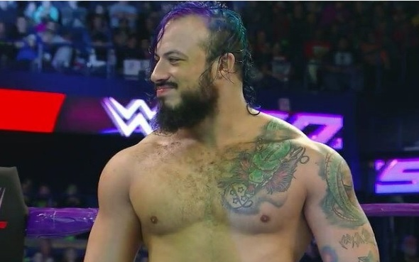 Mr.450 en WWE 205 Live